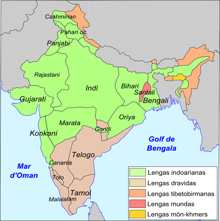 Lengas principalas d'Índia.